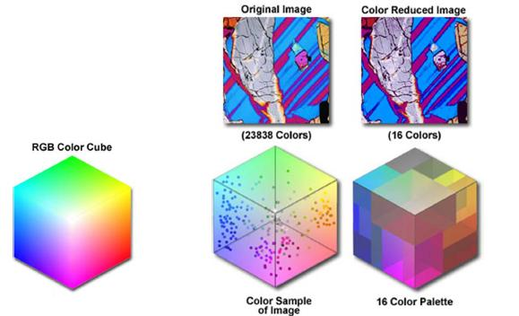 median cut en imatges i cub rgb